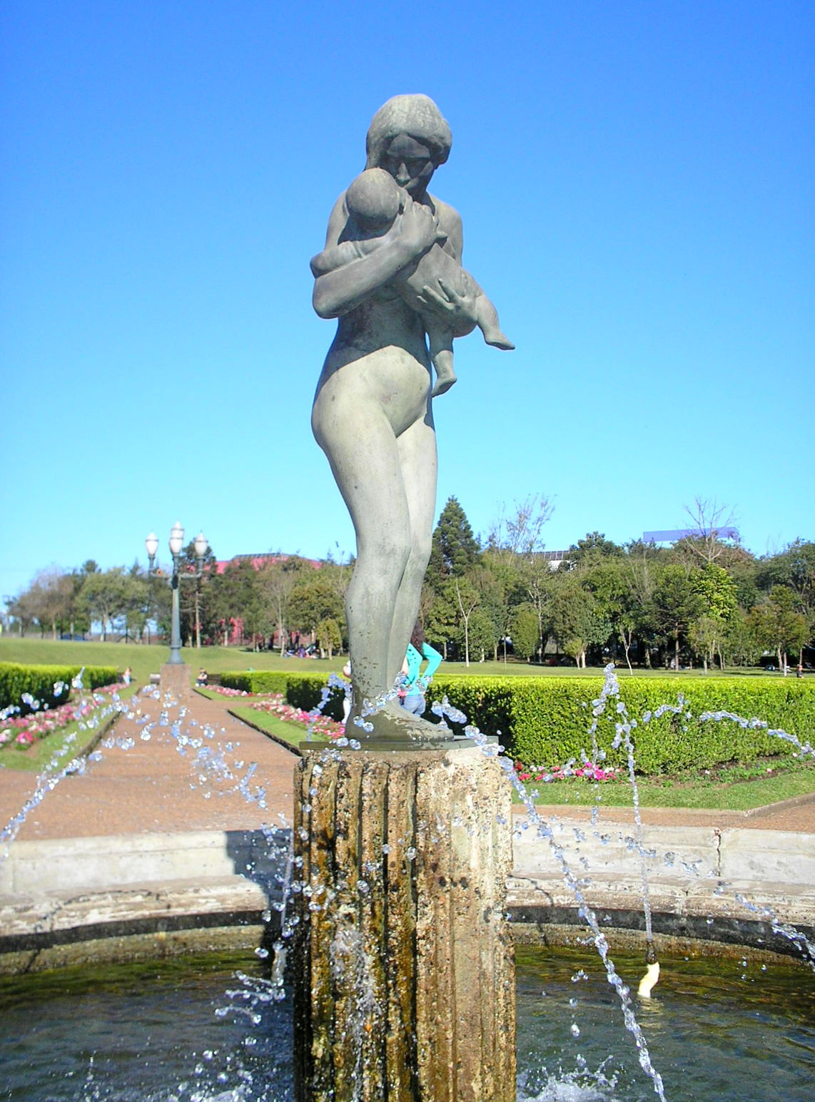 Fonte no Jardim Botânico de Curitiba com escultura em bronze "Amor Materno", forjada em 1907 pelo artista polonês João Zaco Paraná. Curitiba, Paraná, sul do Brasil.